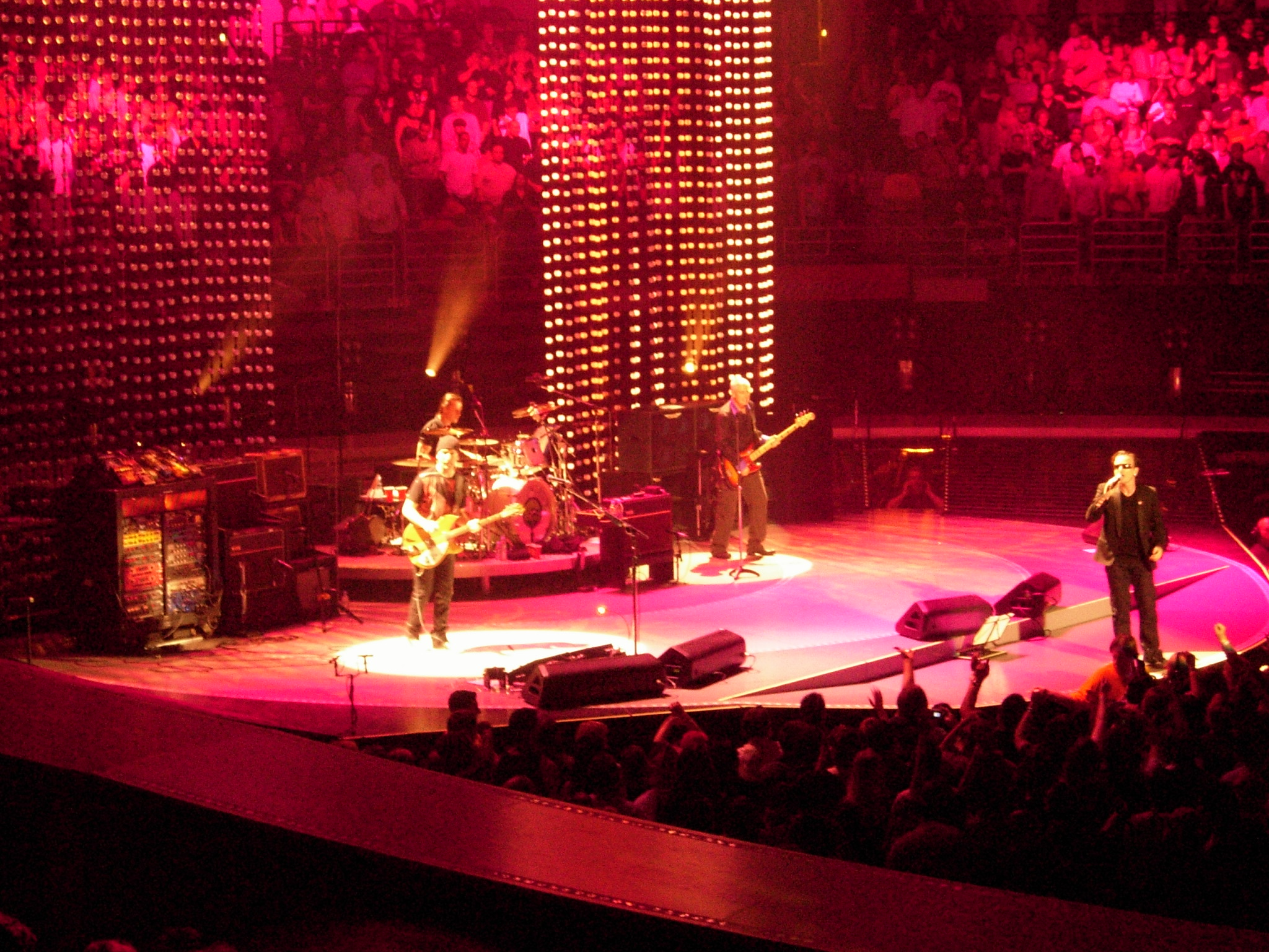 U2 on 1. April 2005 in Anaheim.